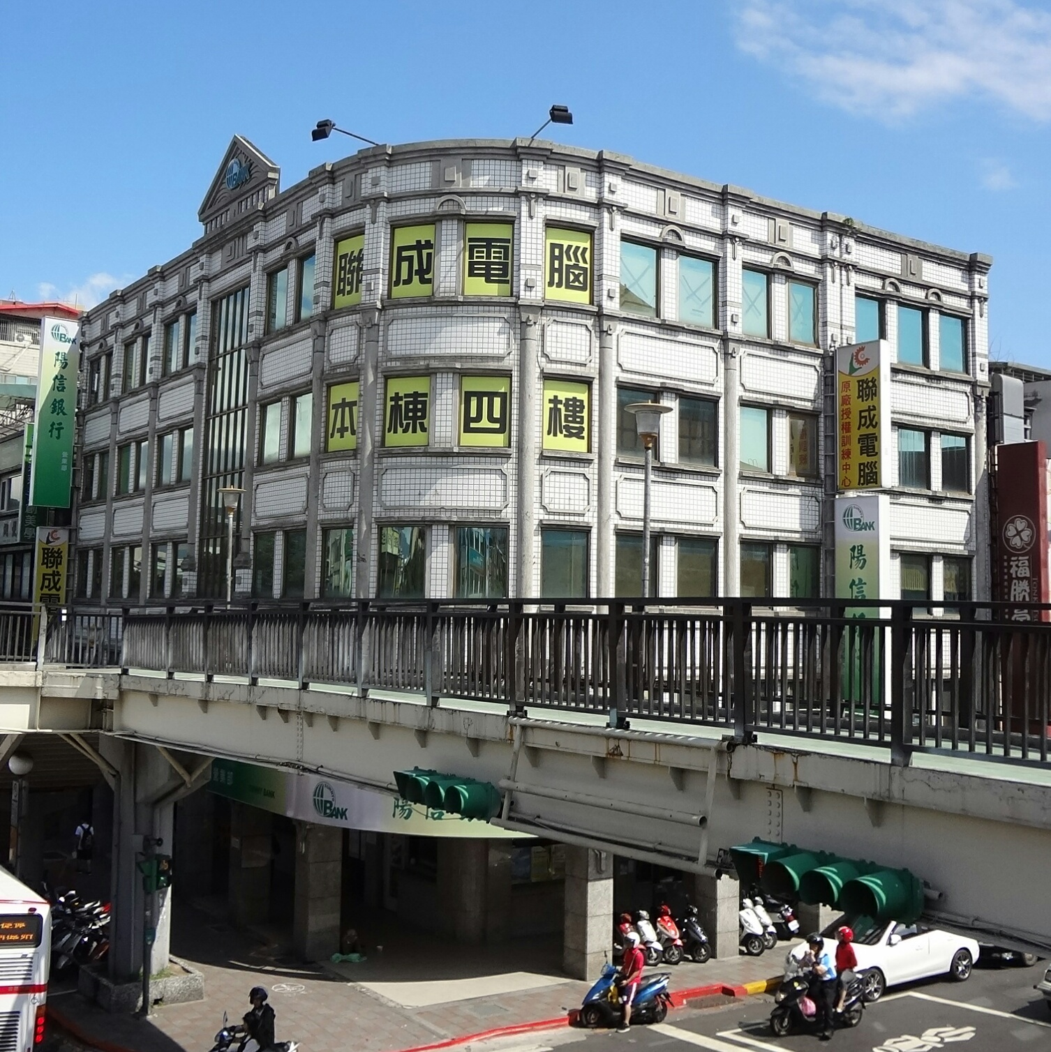 陽信商業銀行營業部，位於臺北市士林區中正路255號（中正路與文林路口）。